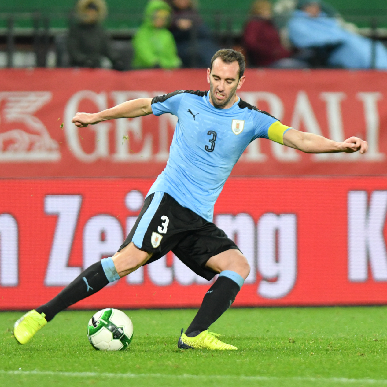 Wien, Österreich, 10.11.2017, Sport, Fussball, OEFB Freundschaftliches Laenderspiel - Österreich vs Uruguay. Bild zeigt Diego Godin (URU).